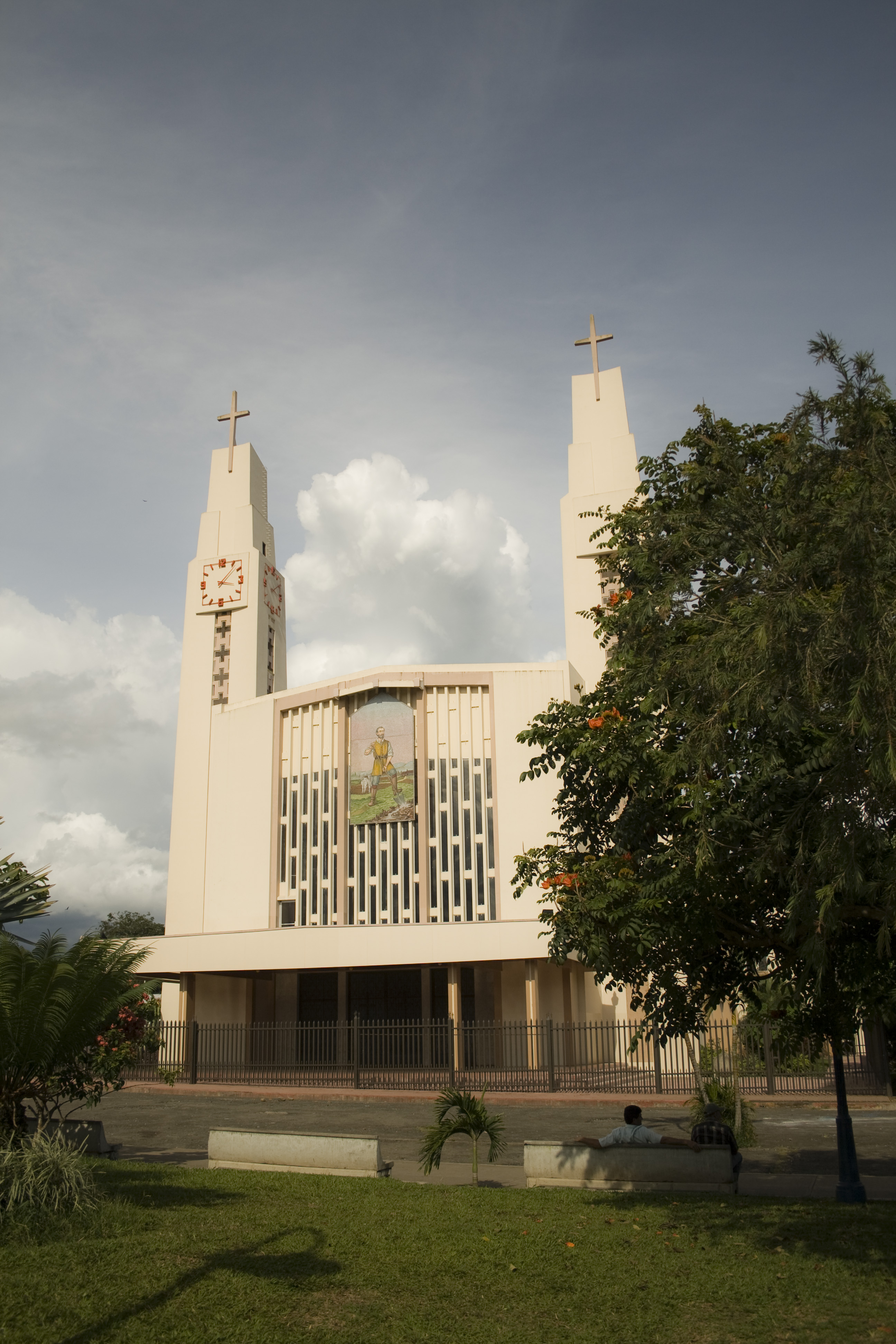 Iglesia de Pérez Zeledón. Cantón de Pérez Zeledón. Provincia de San José. Costa Rica.